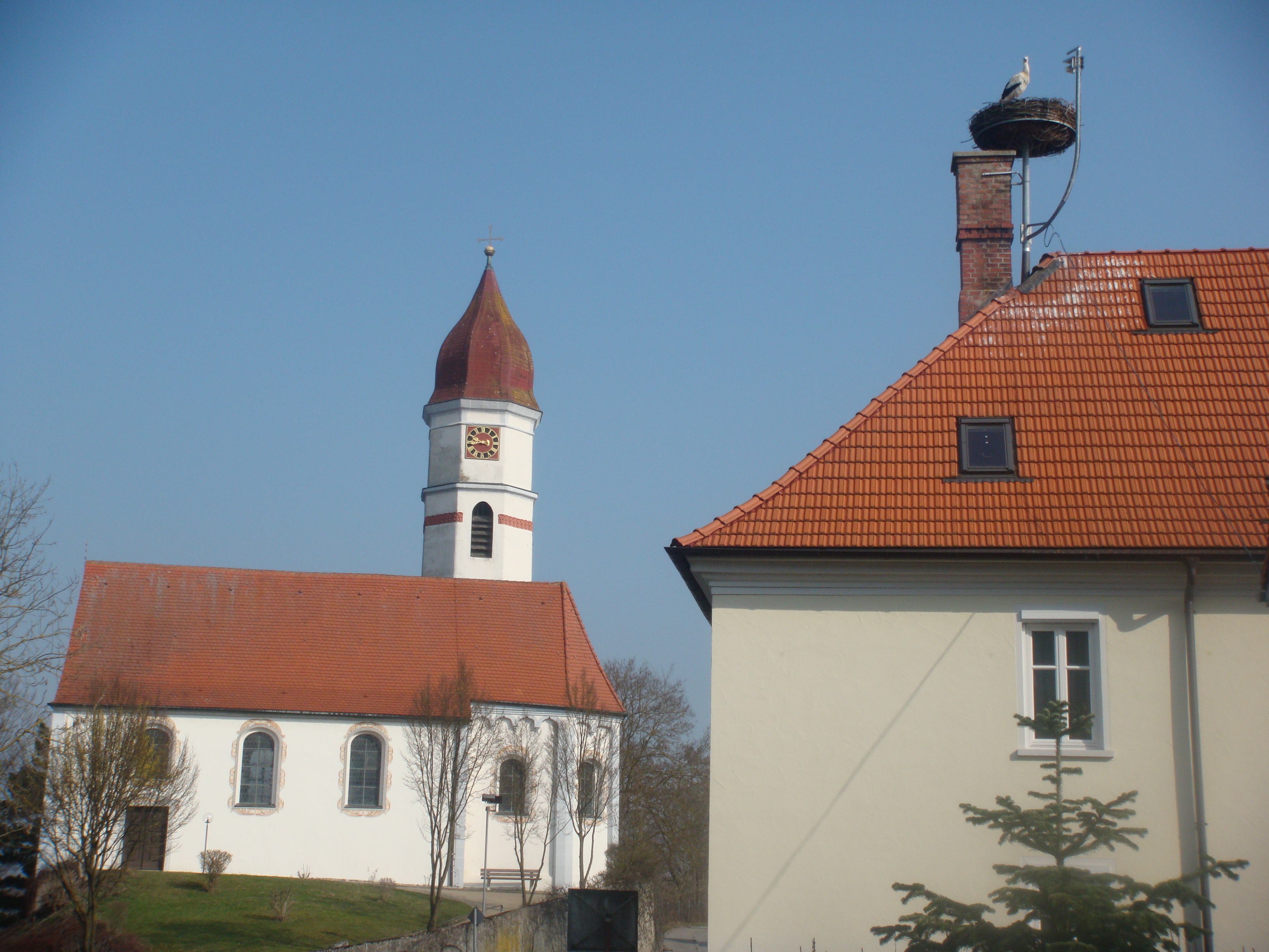 Gögglingen Hl. Kreuz Kirche mit Storchennest